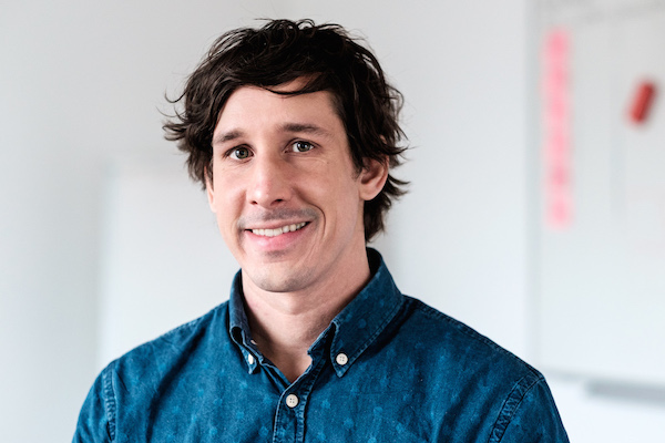 Jan Christe, deutscher Journalist und Unternehmer